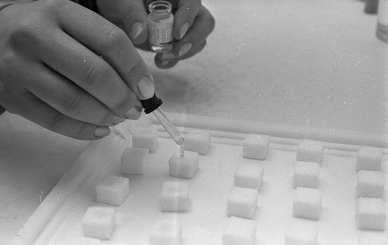 Polio-Schutzimpfung im Gesundheitsamt Bonn